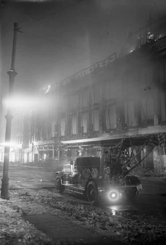 Der Riesenbrand des Warenhauses Hermann Tietz in der Chausseestrasse in Berlin! Das Warenhaus brannte völlig aus. Der Brand dauerte 15 Stunden. Der Schaden geht hoch in die Millionen Mark. Nachtaufnahme des brennenden Warenhauses Hermann Tietz in der Chausseestrasse in Berlin.